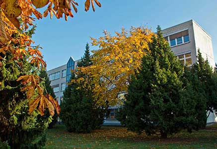 Hochschulgebäude mit Campusgarten, DHGS